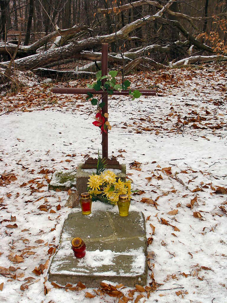 Cmentarz rodziny Jaeckel w Uroczysku Szwedzki Młyn w Puszczy Bukowej pod Szczecinem